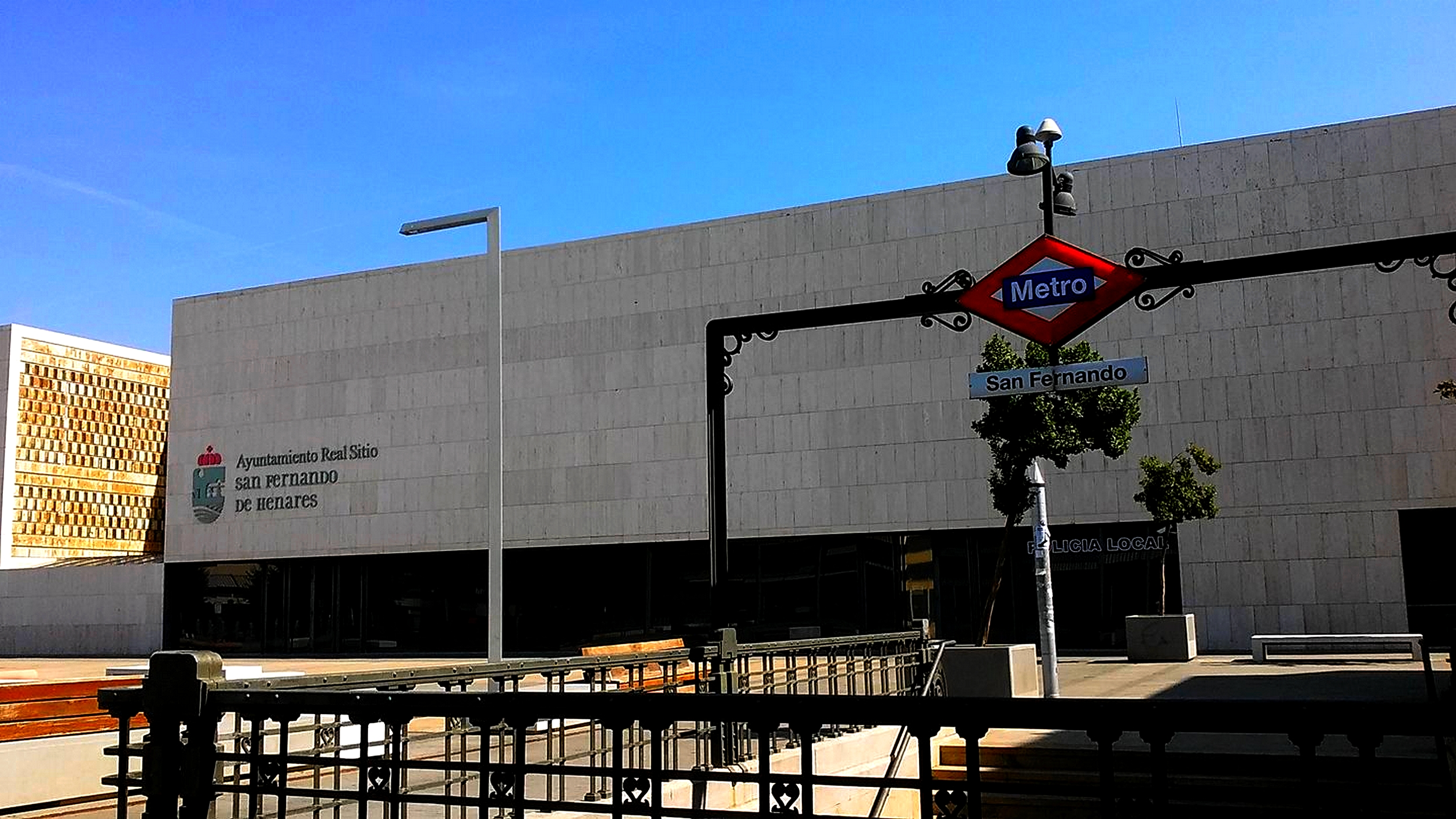 Estación del Maetro de Madrid en la Plaza del Ayuntamiento de San Fernando de Henares.